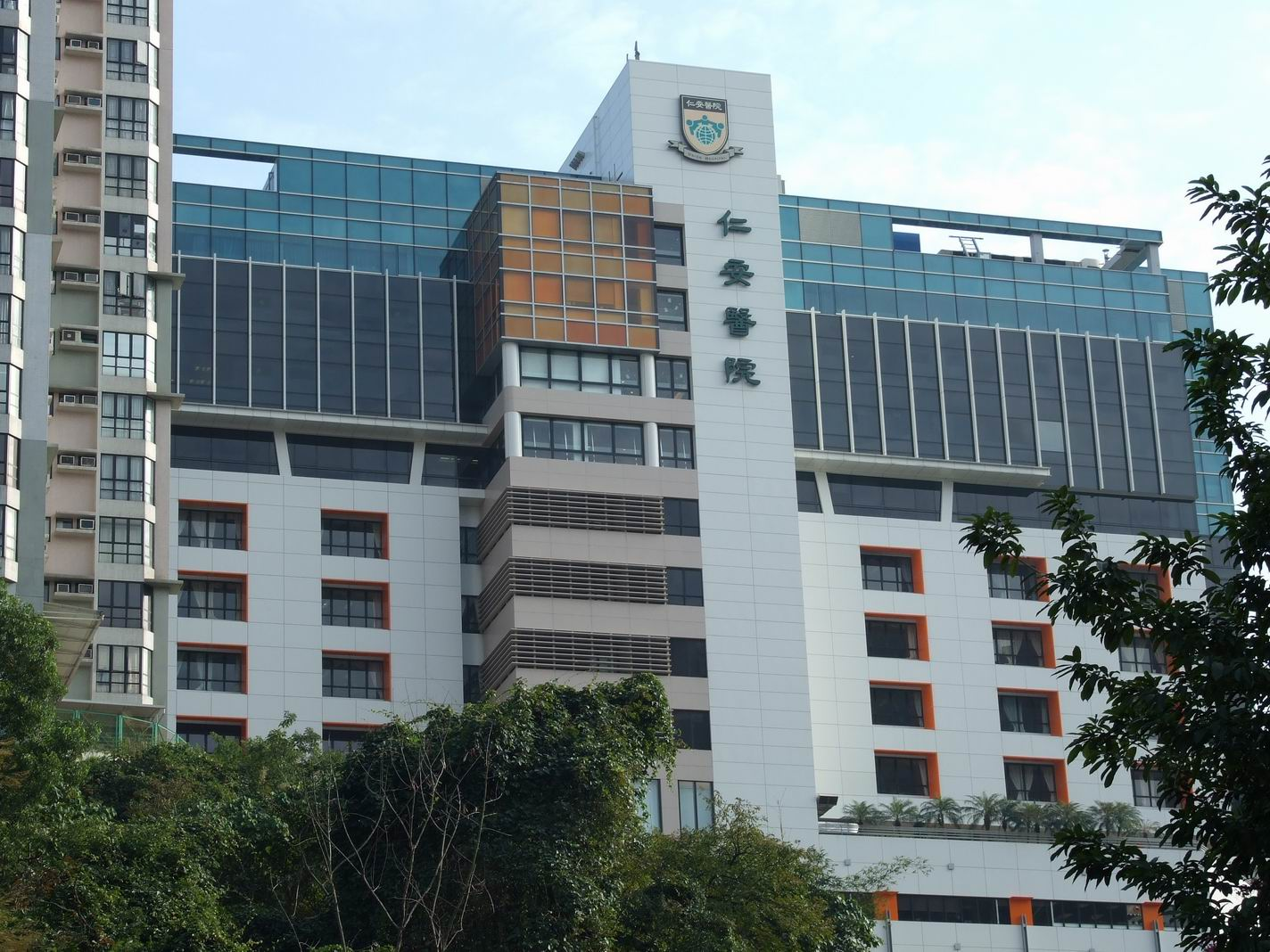 仁安醫院